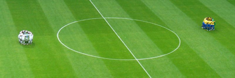 WM Achtelfinale: Brasilien - Ghana / vor dem AnstossWM Achtelfinale: Brasilien - Ghana / vor dem Anstoss